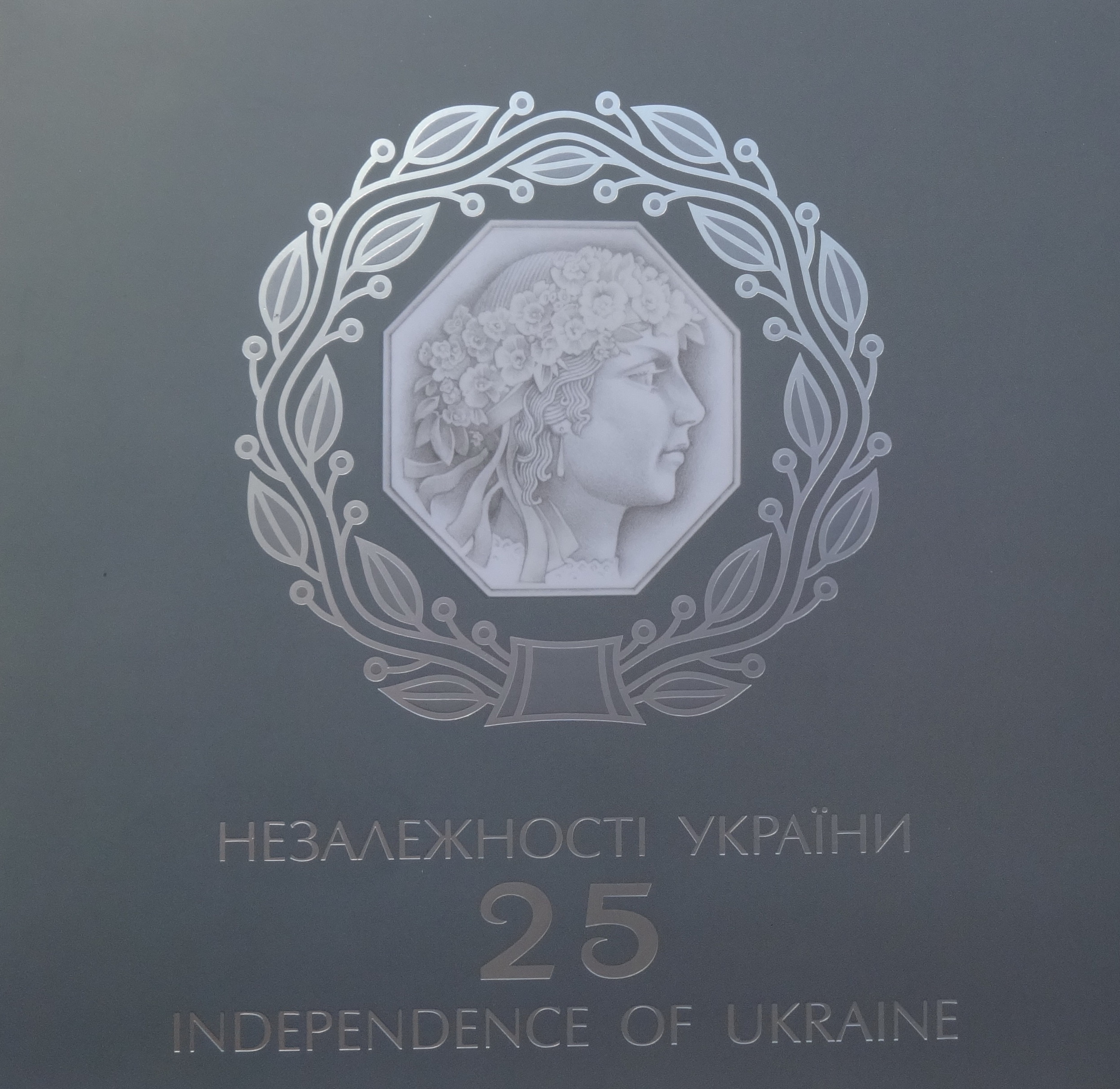 Набір монет НБУ «25 років незалежності України». Обкладинка.